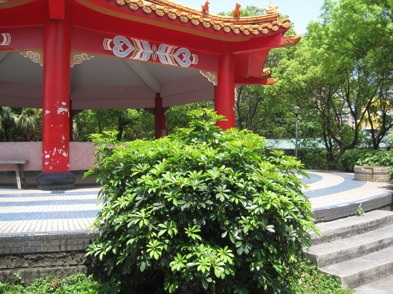 在積穗配水池的上方加建涼亭